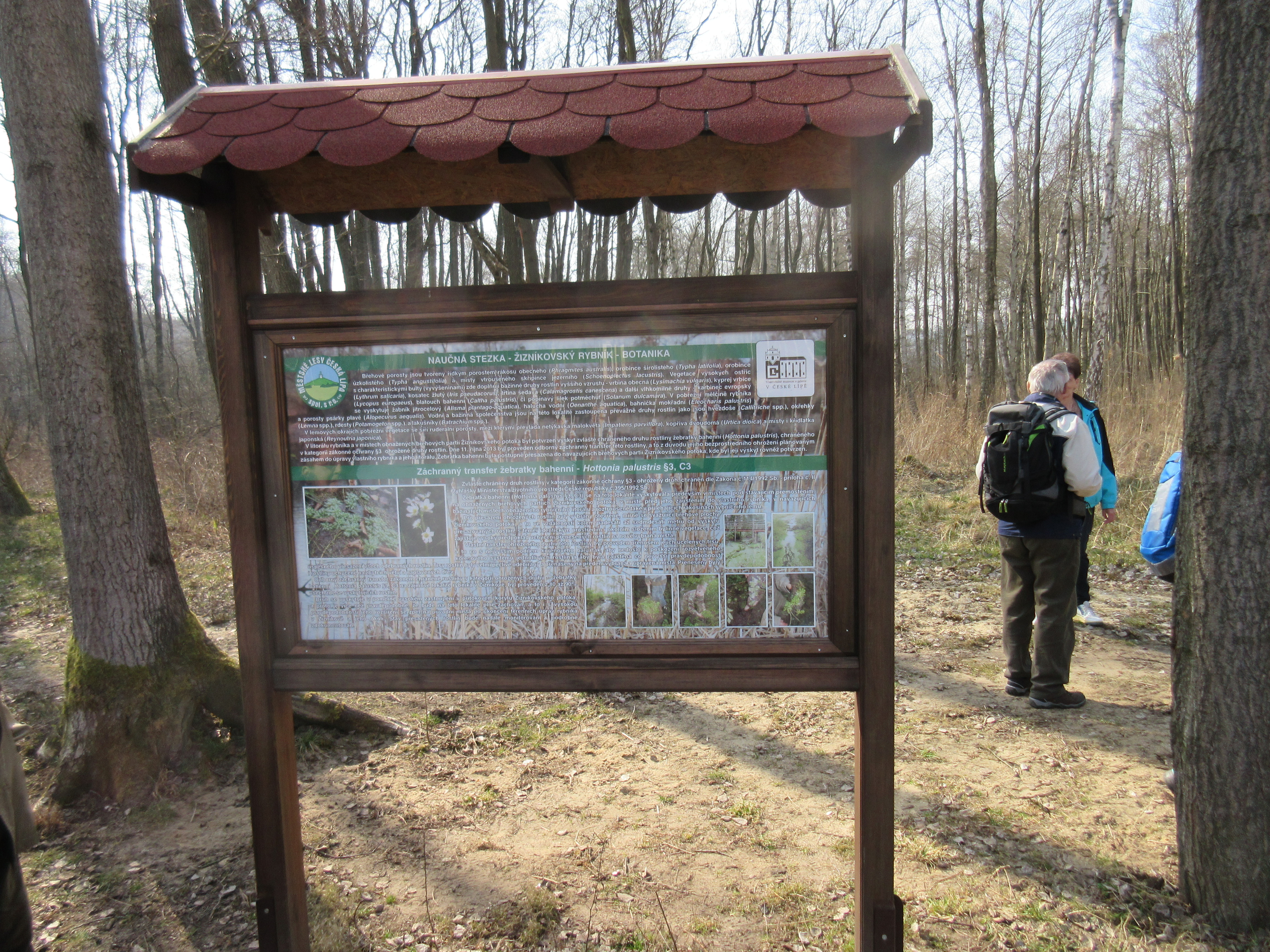 Infotabule nové naučné stezky Žizníkovský rybník